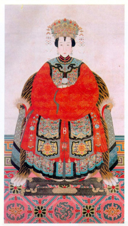 中文（香港）: 七十四代衍聖公 繼配畢夫人衣冠像